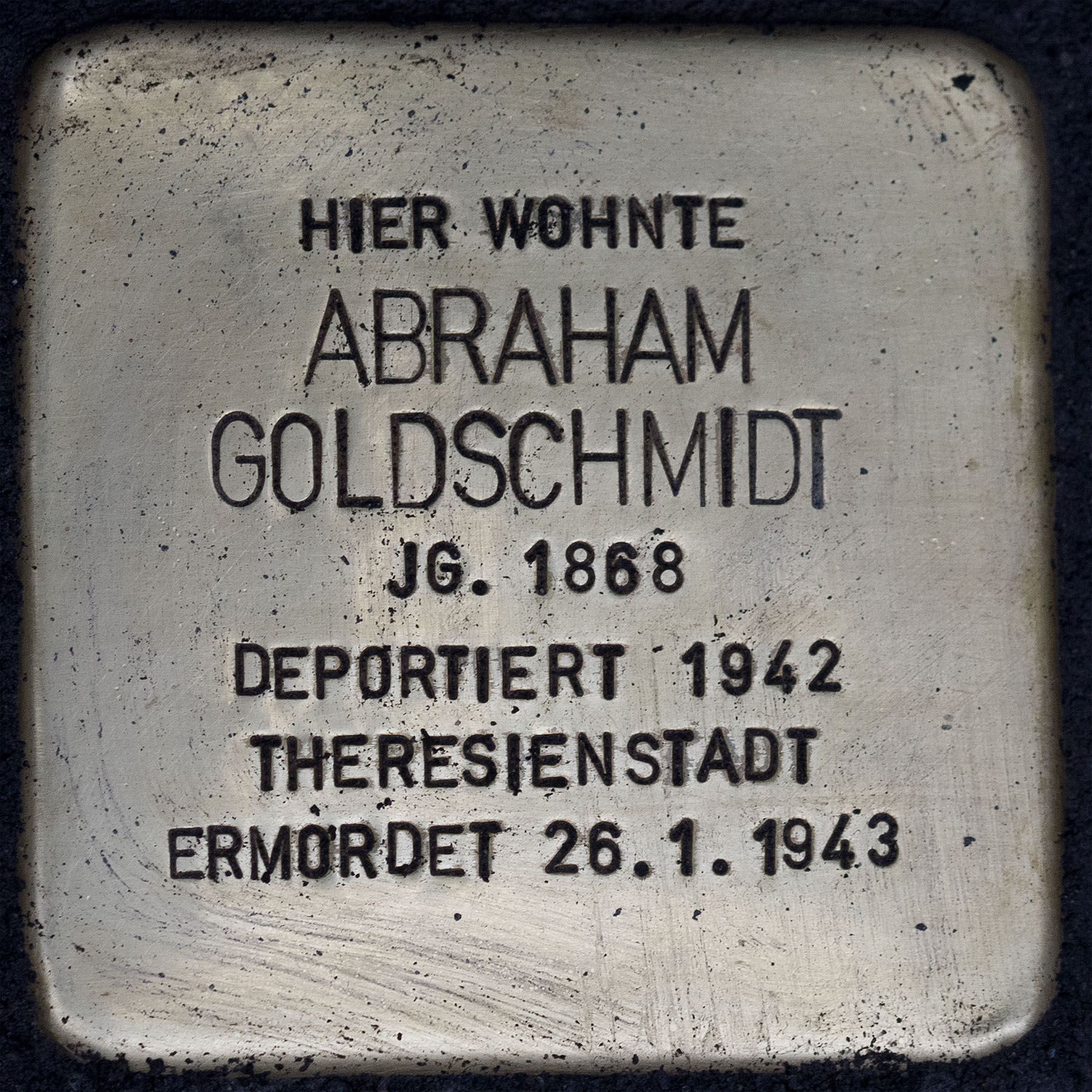 Stolpersteine Kempen: Abraham Goldschmidt